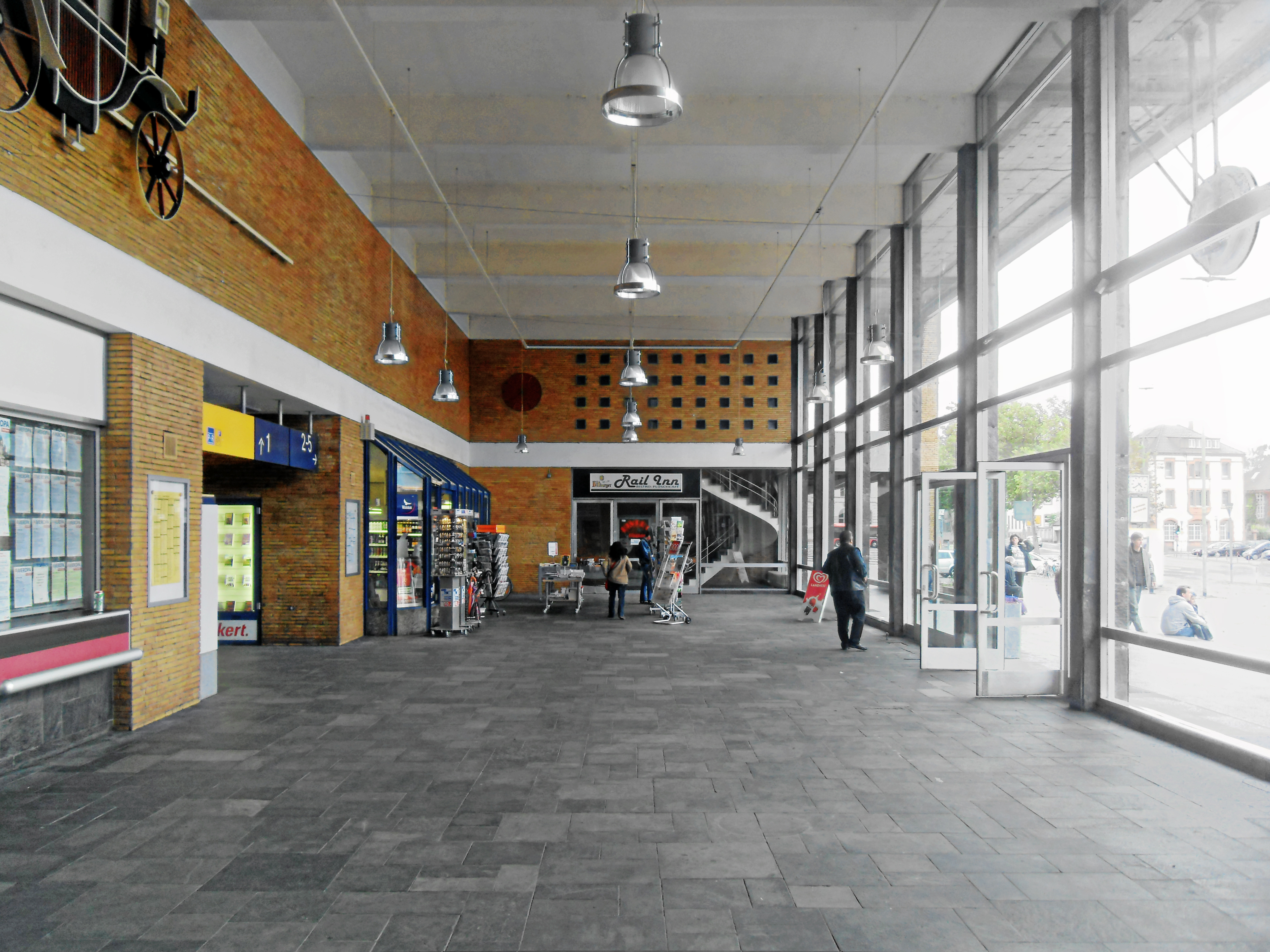 Die Haupthalle des Landauer (Pfalz) Hauptbahnhofs